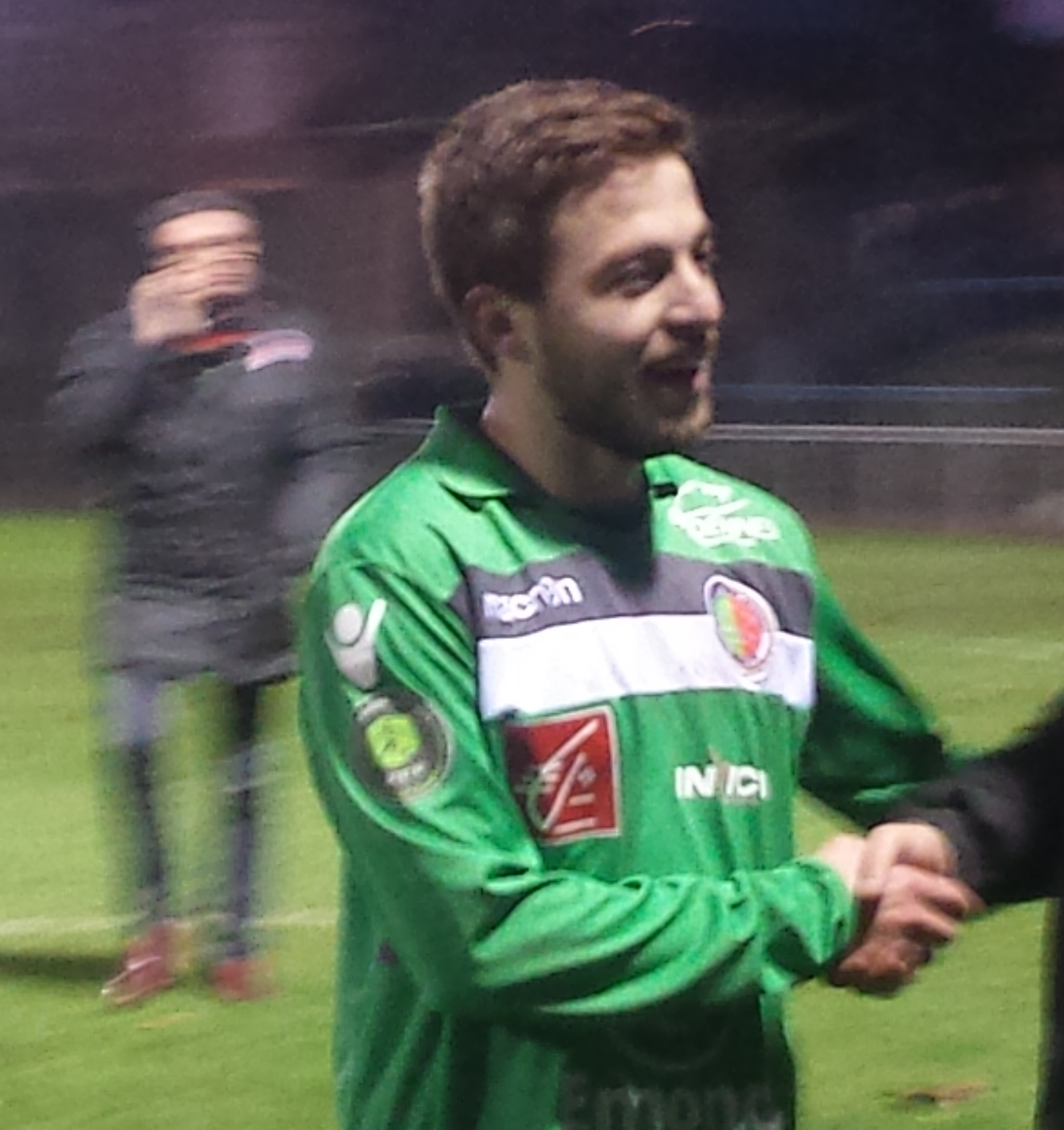 Jean-Jacques Rocchi lors du match Lens B - Sedan, au Stade François-Blin d'Avion, match comptant pour le championnat de France de CFA (quatrième division française), le 24 janvier 2015.